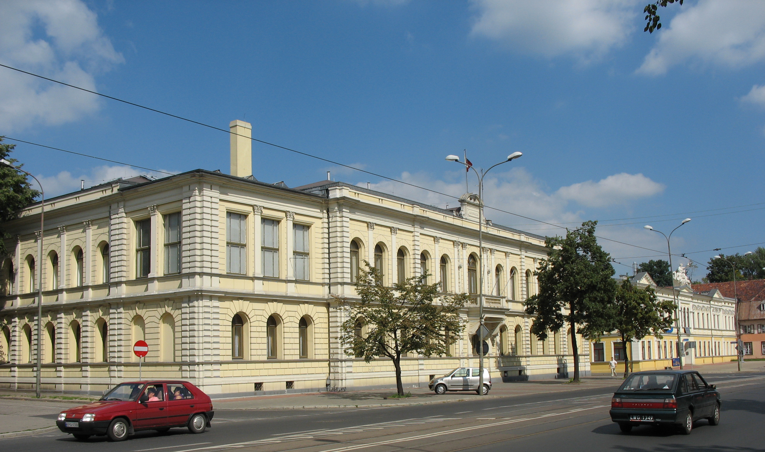 Dawny pałac rodziny Enderów - Obecnie siedziba władz powiatu pabianickiego